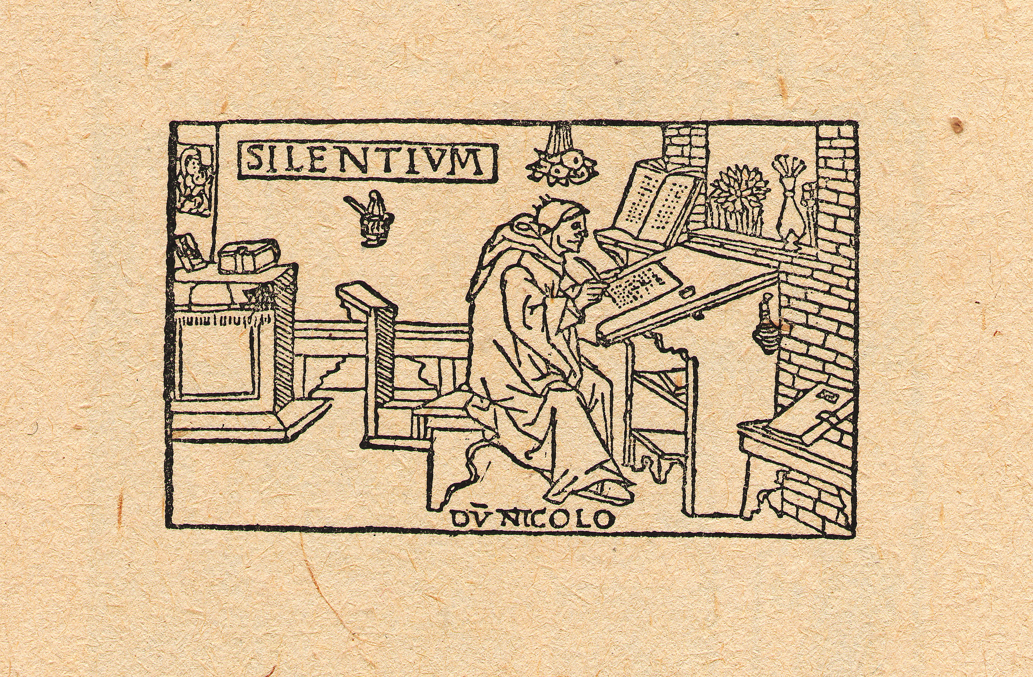 Giunta: Schreiberwerkstatt – aus der italienischen Bibel, die 1490 in Florenz entstand (Reproduktion aus dem 20. Jahrhundert)